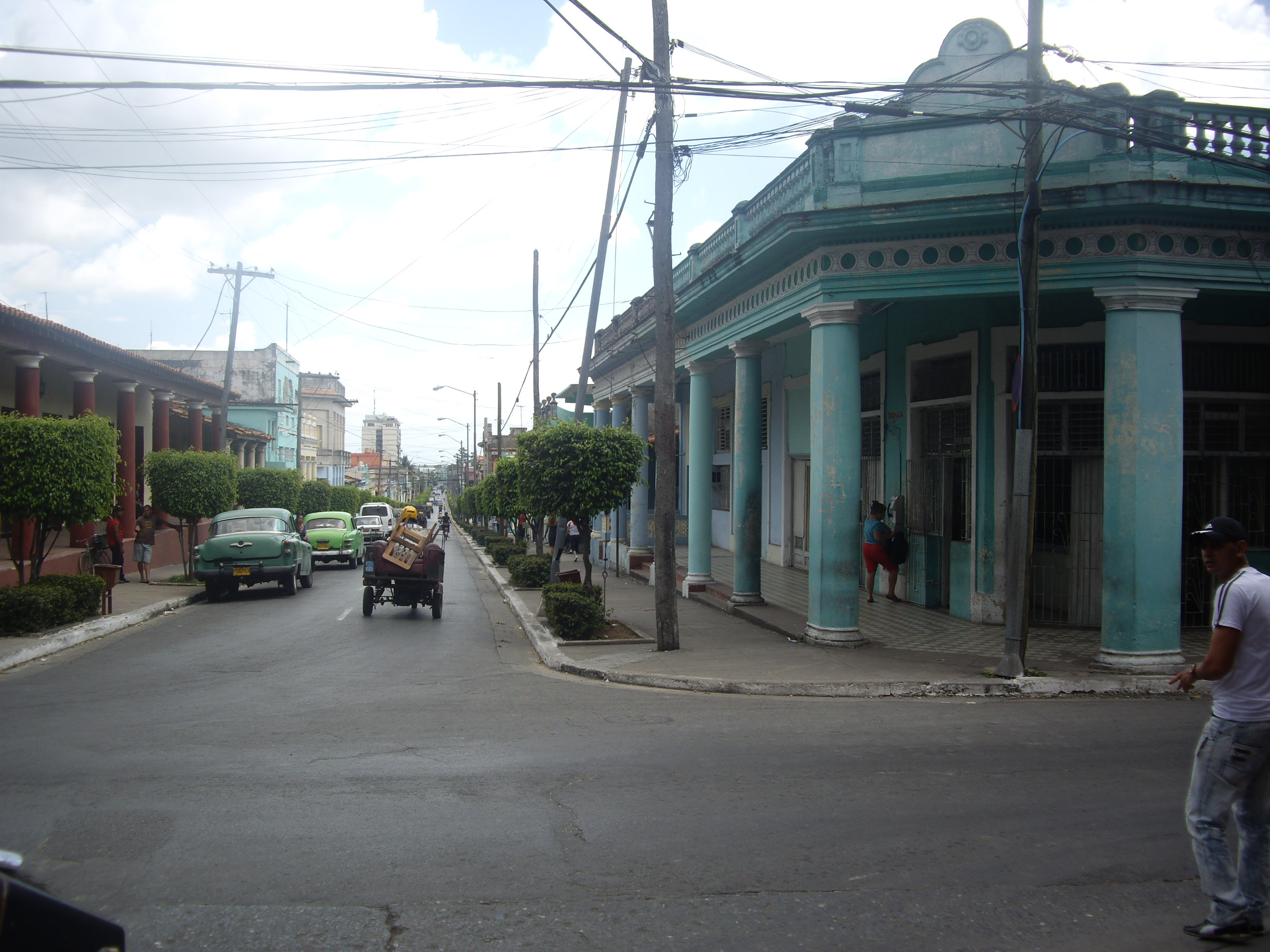 Carrer Antonio Maceo a Pinar del Rio